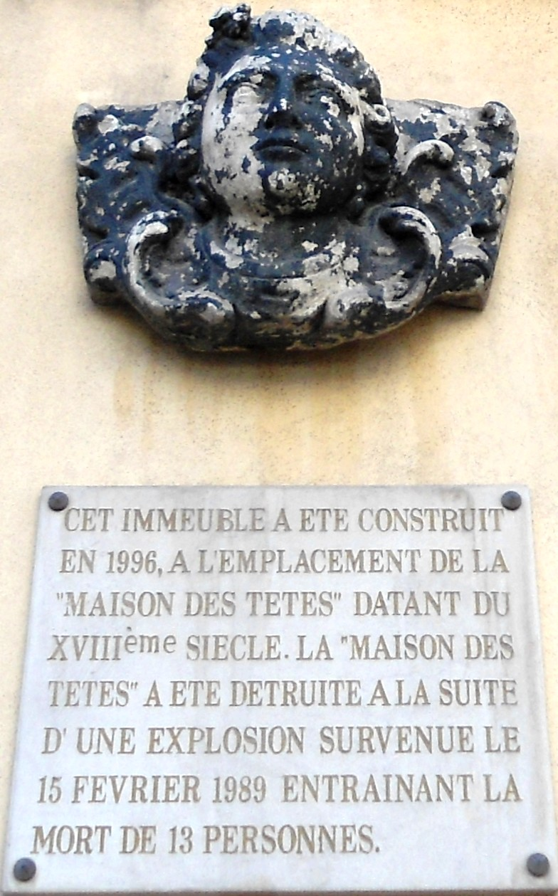 placa de l'ostau dei testas